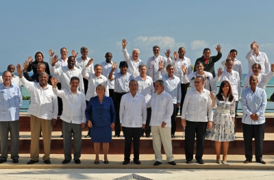 Foto oficial de la XXI Cumbre del Grupo Río en Cancún.